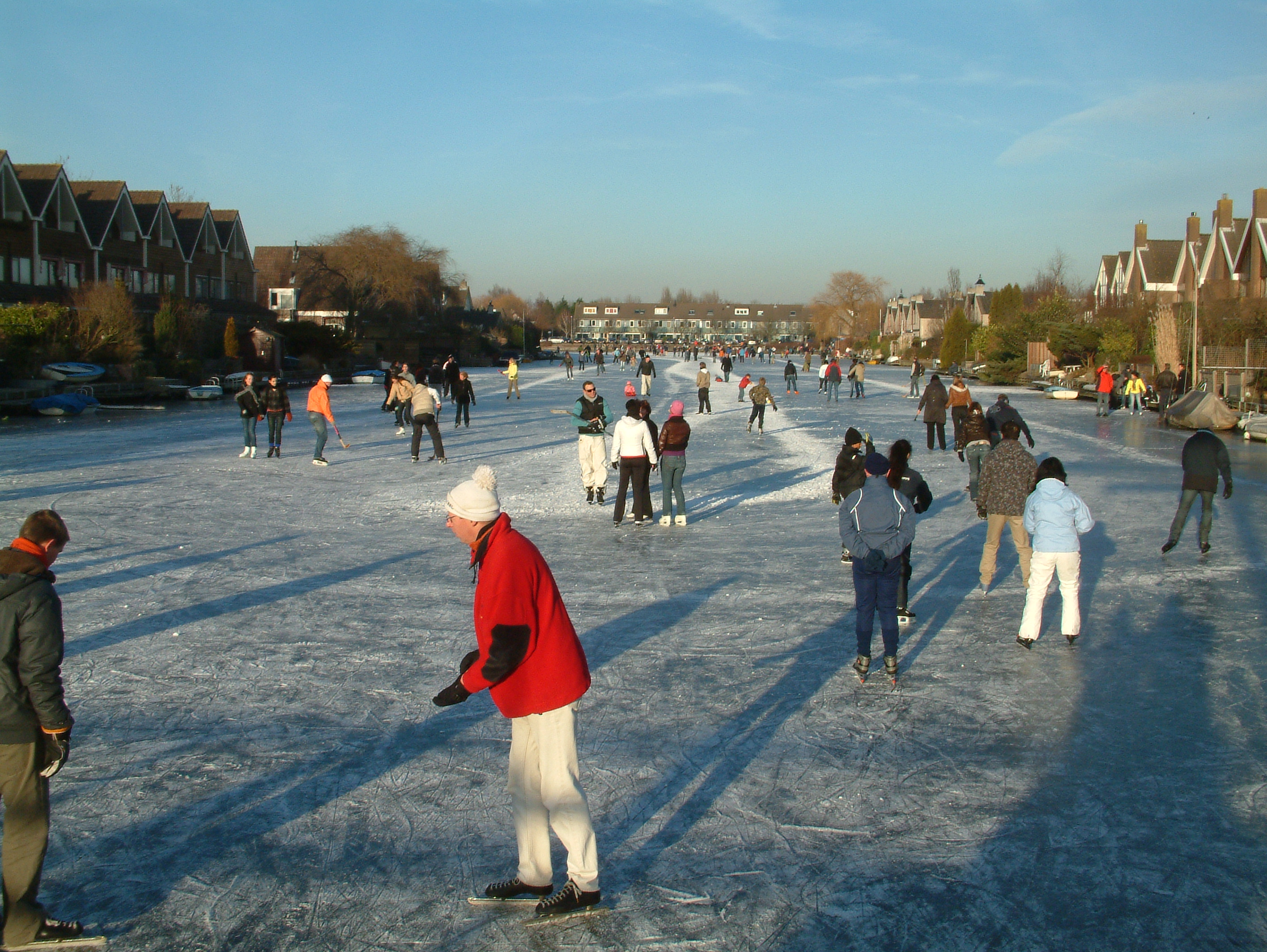 IJspret op de Broekwegwetering